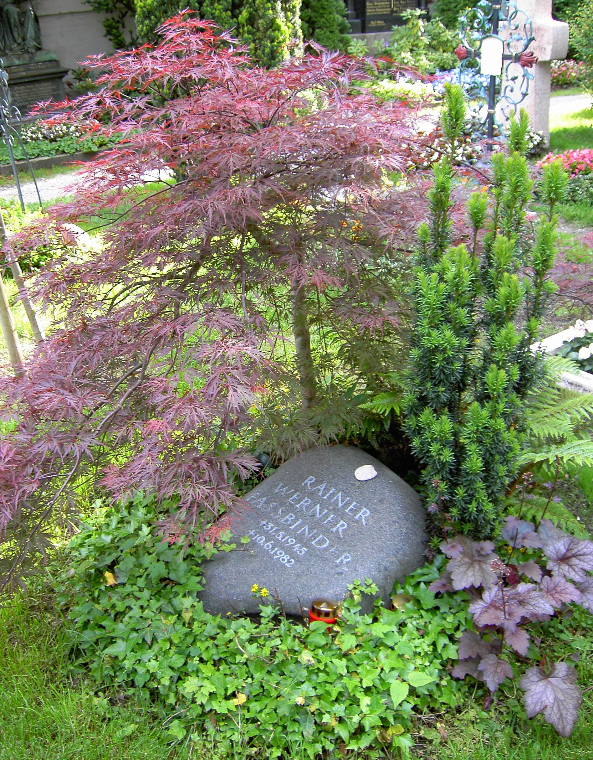 Grabstaette Rainer Werner Fassbinder, St. Georg (Bogenhausen)